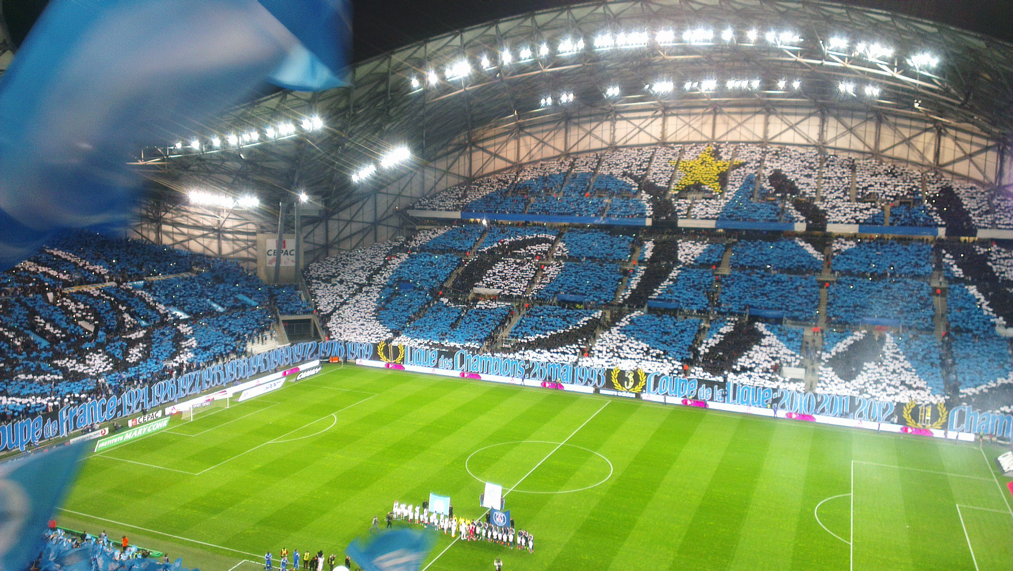 Stade Vélodrome, Marseille. Olympique Marseille contre Paris Saint-Germain, 31. journée de la saison 2014-2015 de Ligue 1.